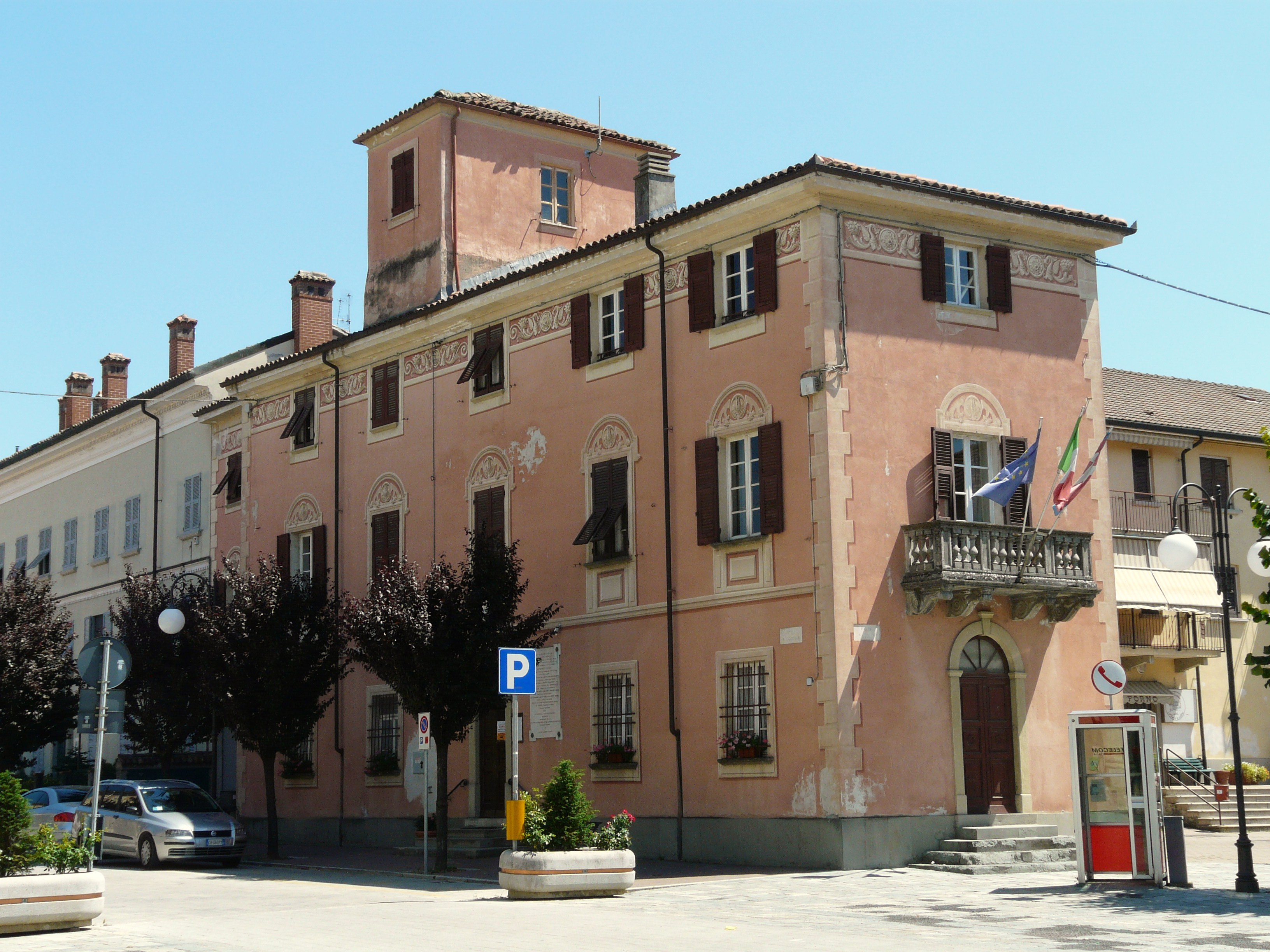 Municipio di Vignole Borbera, Piemonte, Italia